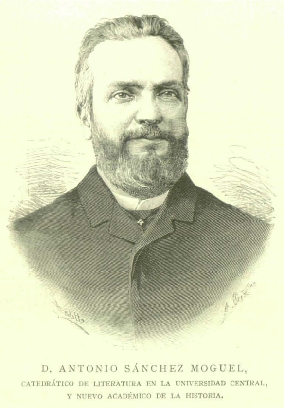 Antonio Sánchez Moguel, catedrático de literatura en la Universidad Central y nuevo académico de la Historia